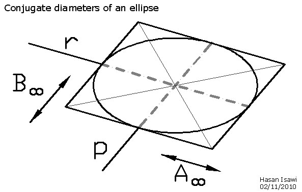 Diametri coniugati di un ellisse